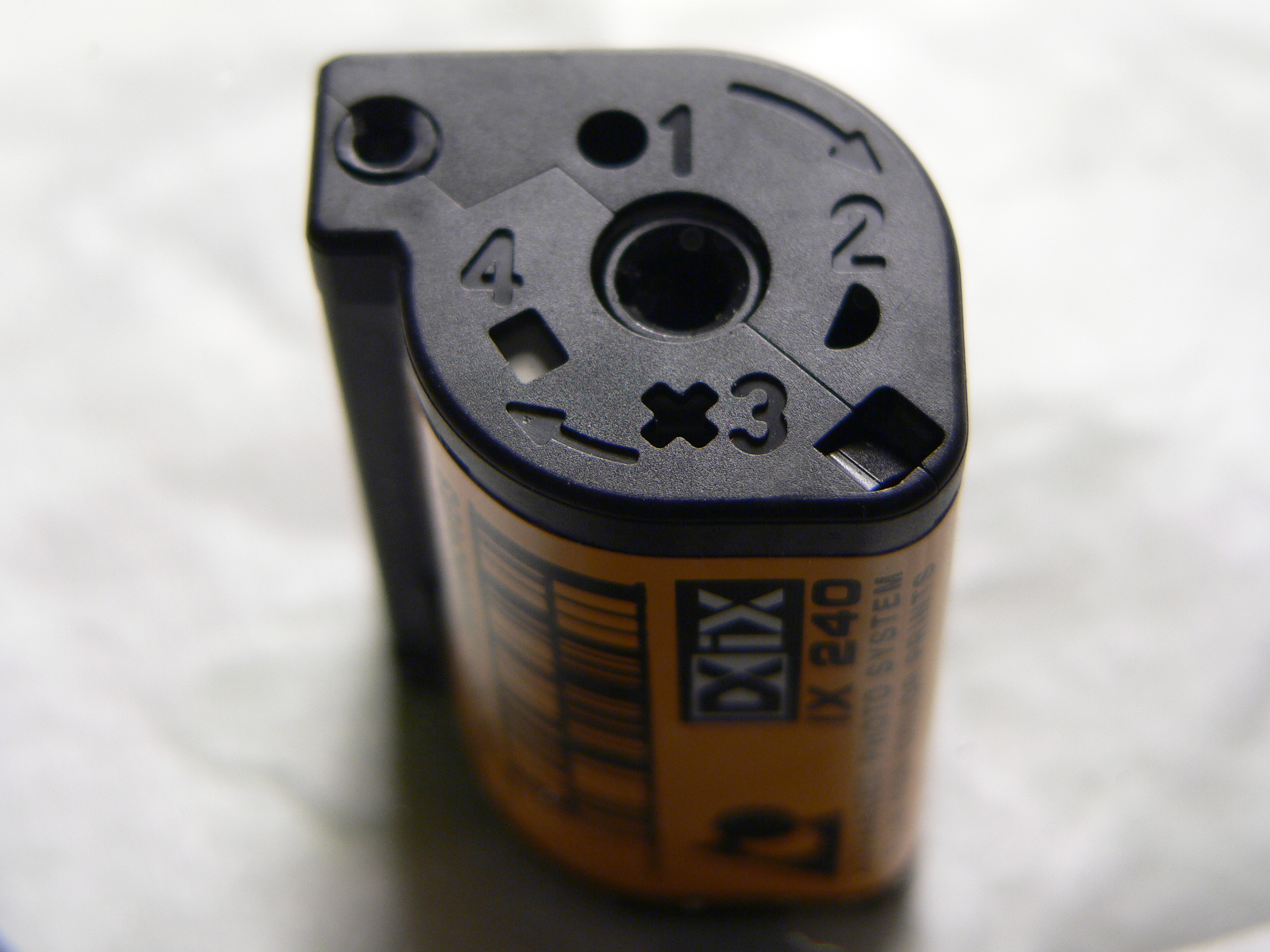 APS Film